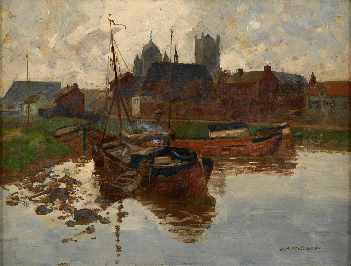 Ansicht von Neuss. Signiert.